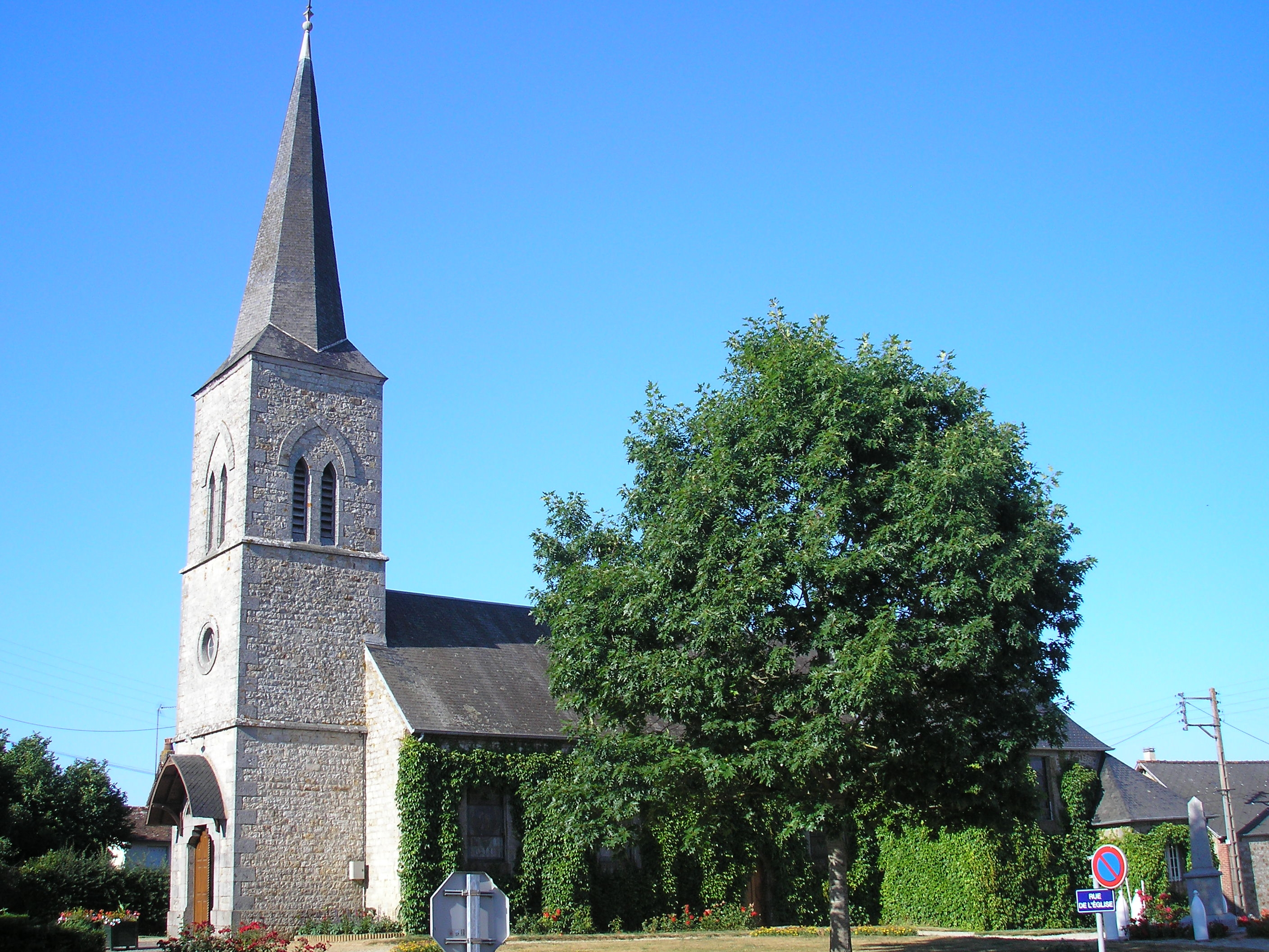 Geneslay (Normandie, France). L'église Saint-Hilaire.